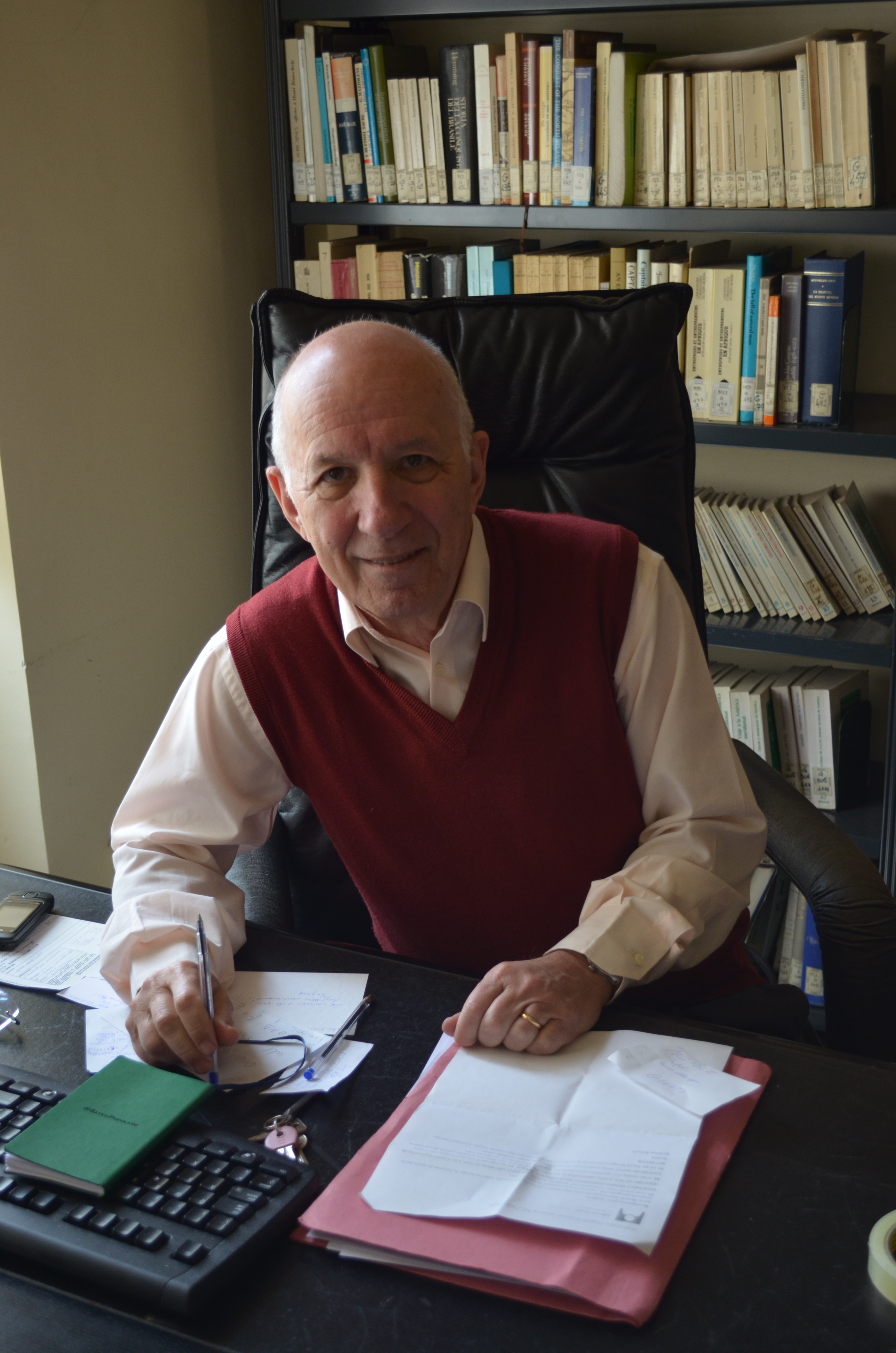 Francesco Surdich prof. della Facoltà di Lettere e Filosofia di Genova